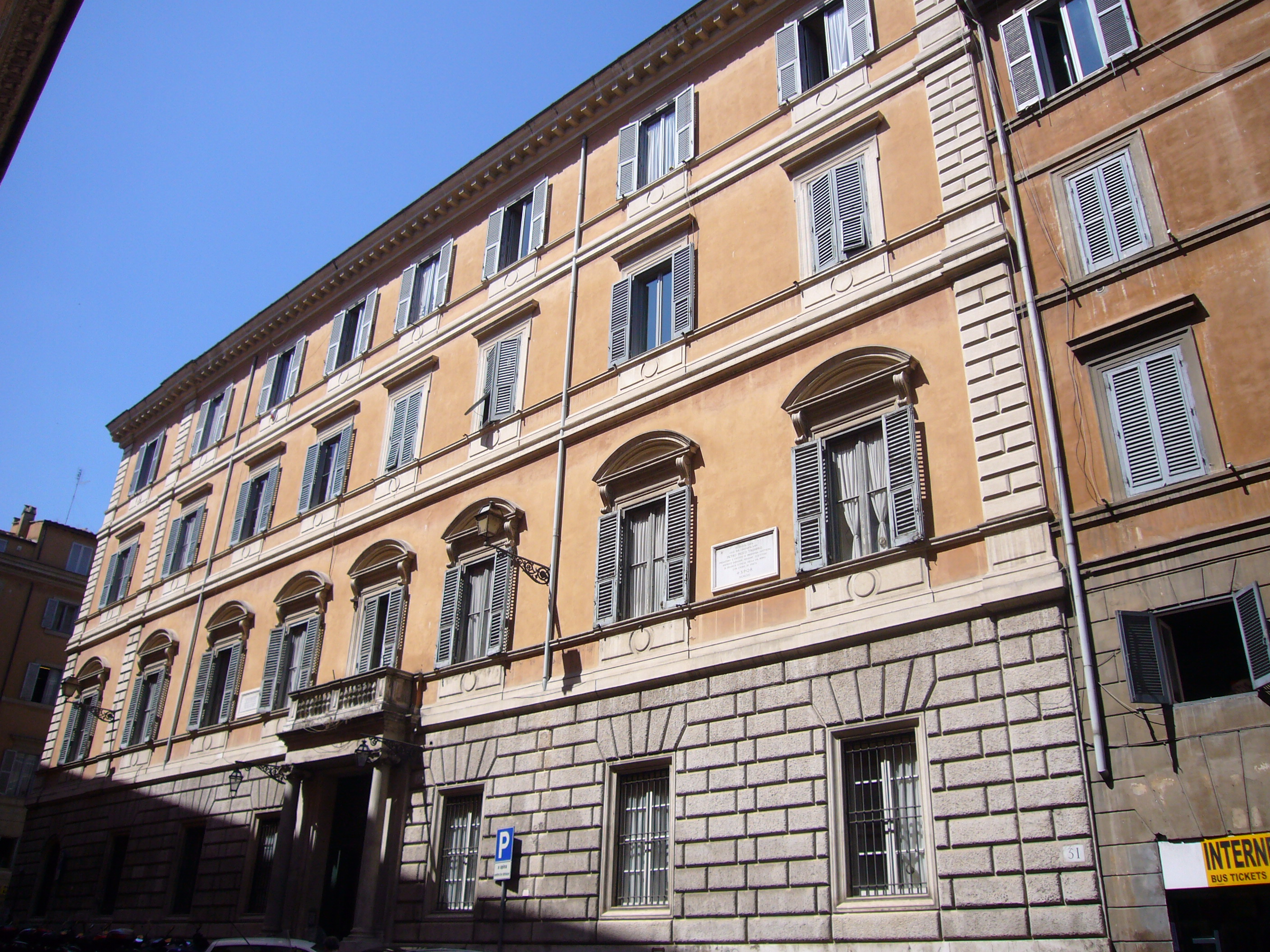 Roma, Biblioteca dell'Istituto dell'Enciclopedia Italiana nella piazza omonima (già piazza Paganica)